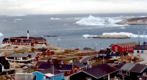 Ilulissat, Grönland